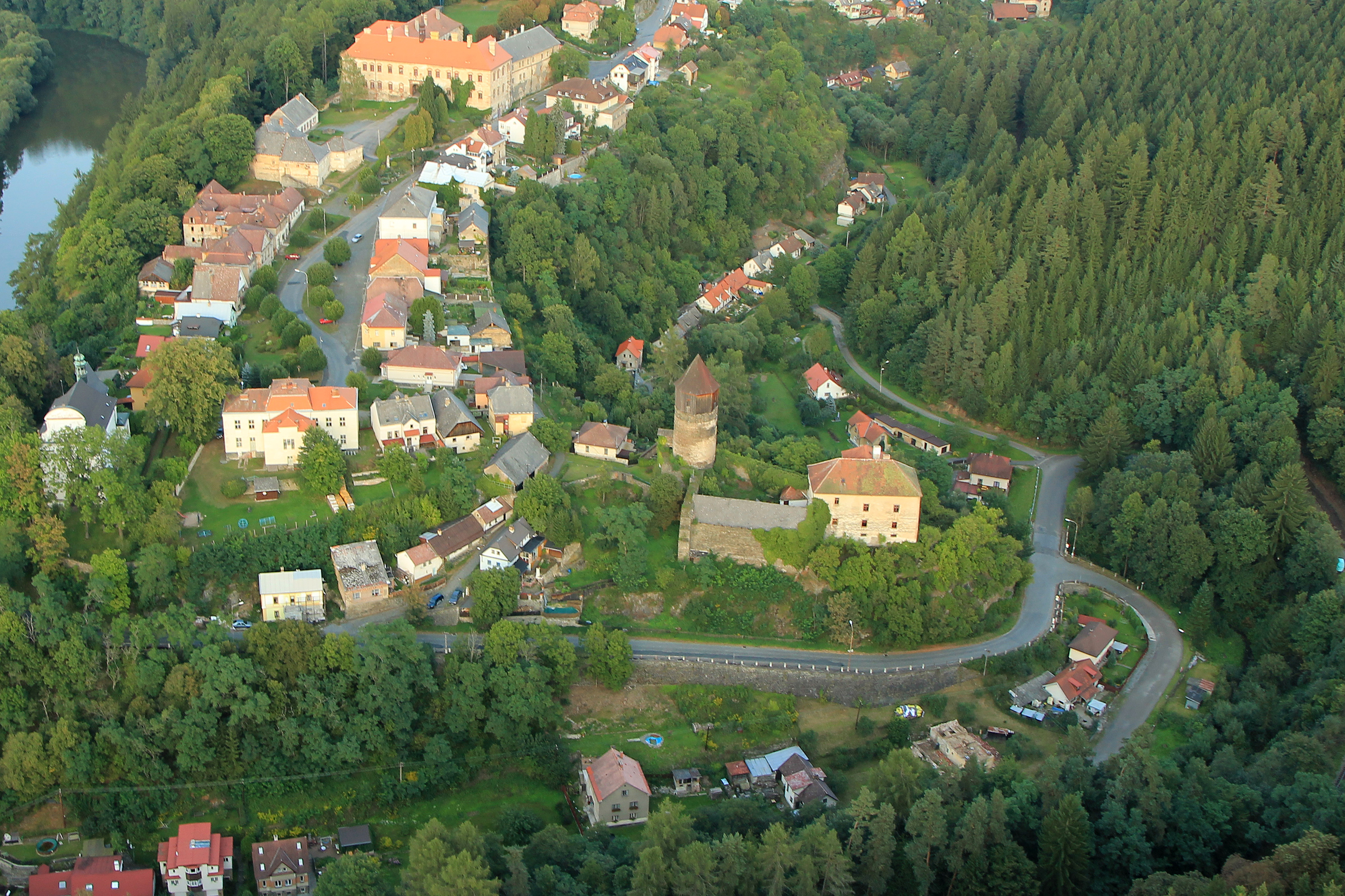 Hrad Pirkštejn (Rataje nad Sázavou), Pod Bránou 19, Rataje nad Sázavou